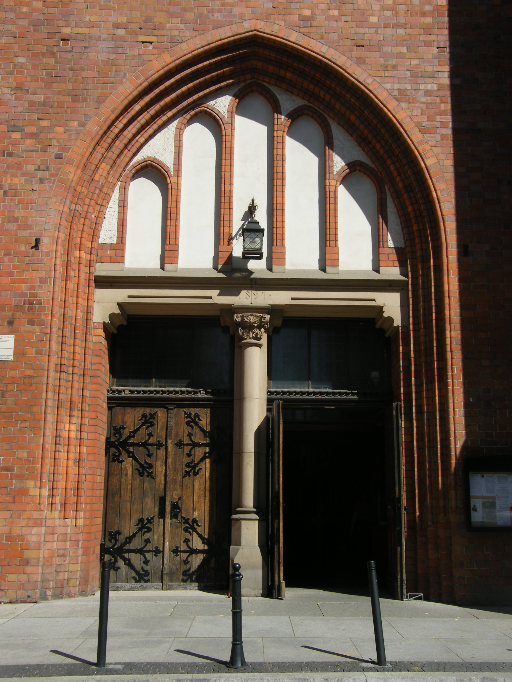 Wrocław, kościół klasztorny augustianów eremitów, ob. par. p.w. śś. Wacława, Doroty i Stani…, 1351-1381, ok. 1400, 3 ćw. XV, 1720-1730, 1892-1899, 1927-1936